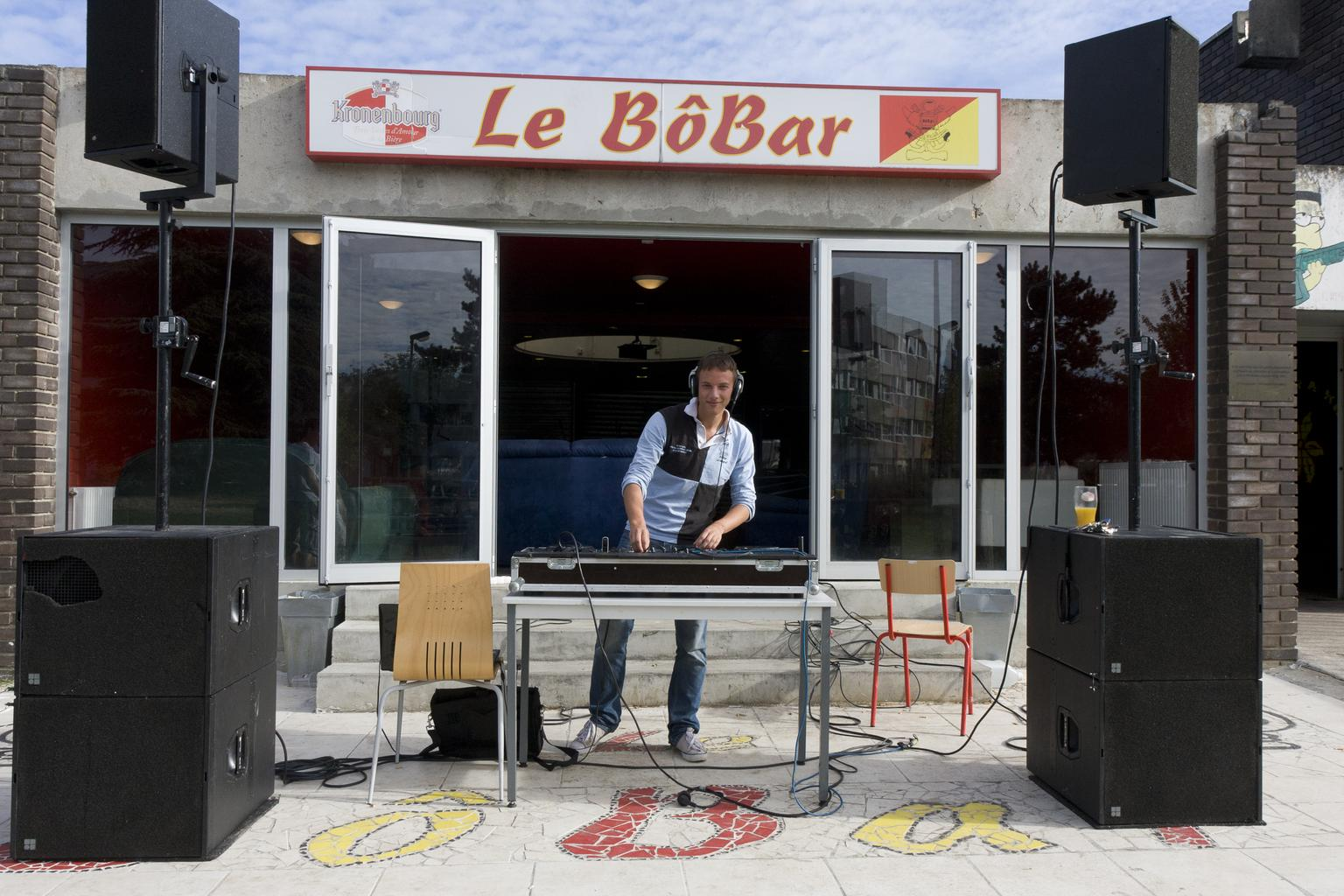 Campus de l'École polytechnique, BôBar, bar de l'École.